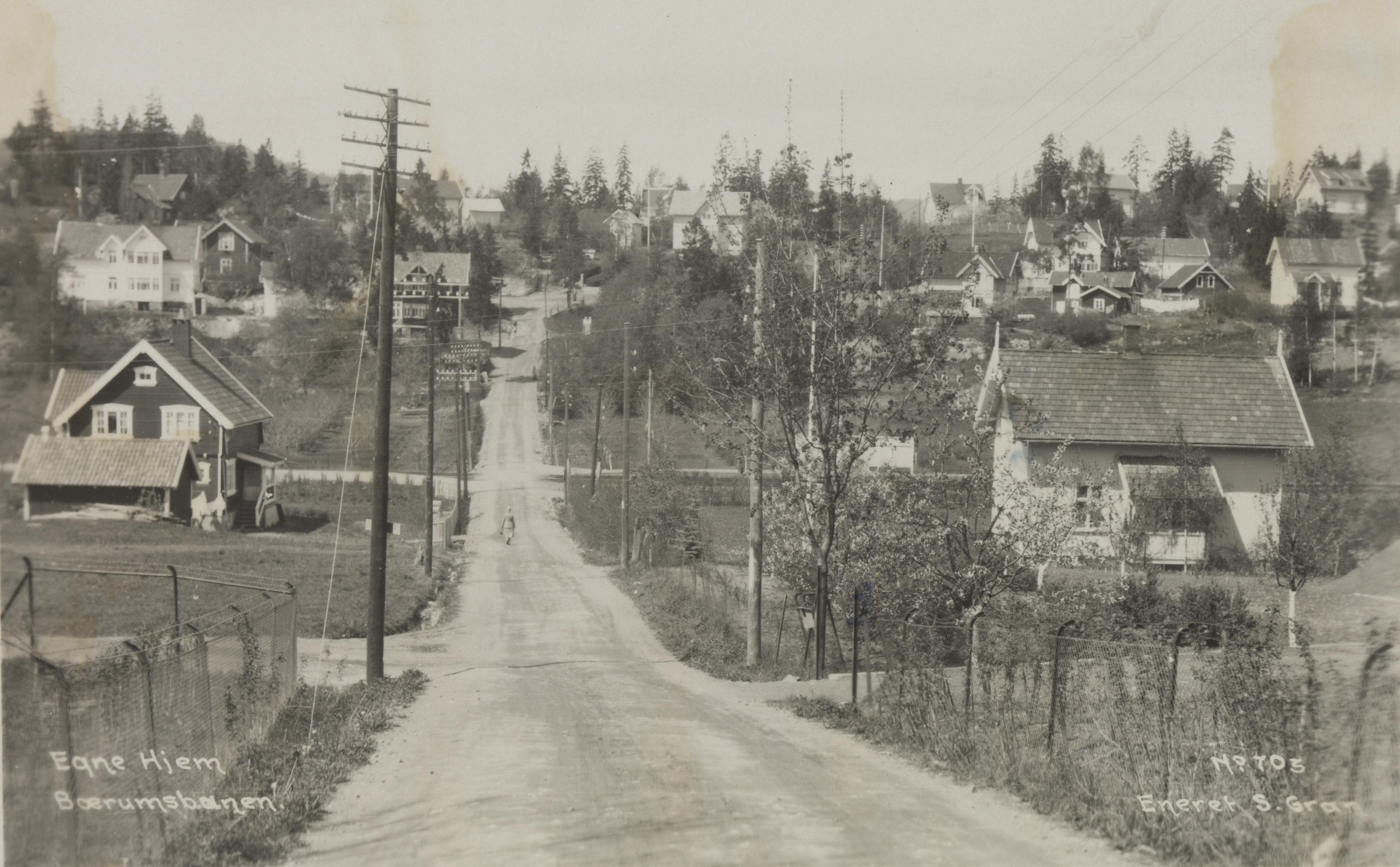 Bildet er hentet fra Nasjonalbibliotekets bildesamling Bærum,Egne Hjem, Bærum, Akershus